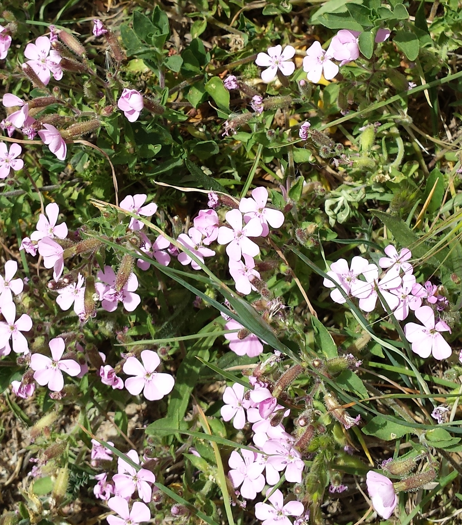 Herba sabonera cultivada (Saponaria) ,Castelltallat, Bages